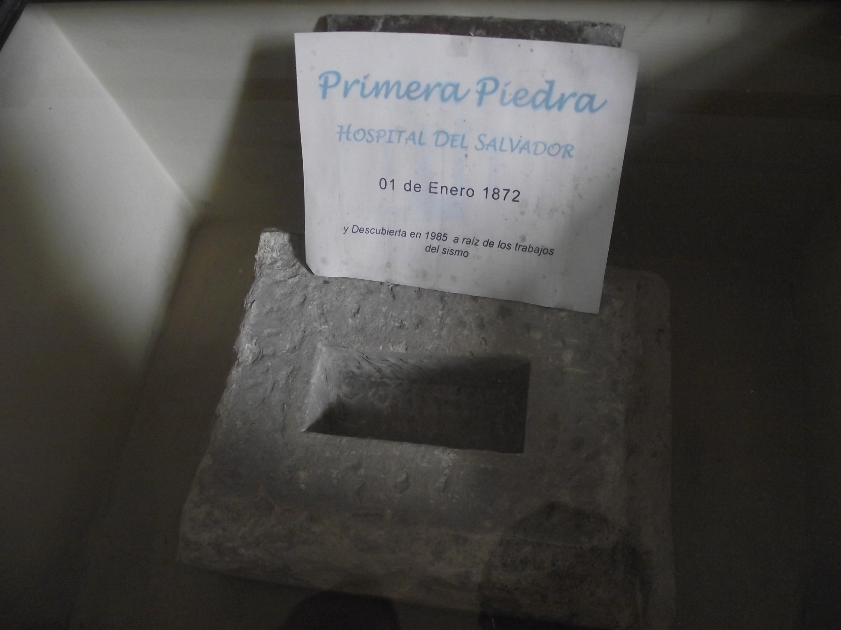 Primera piedra del Hospital del Salvador, instalada el 1 de enero de 1872 y redescubierta en 1985 durante las remodelaciones realizadas tras los daños sufridos debido al terremoto de marzo de 1985.